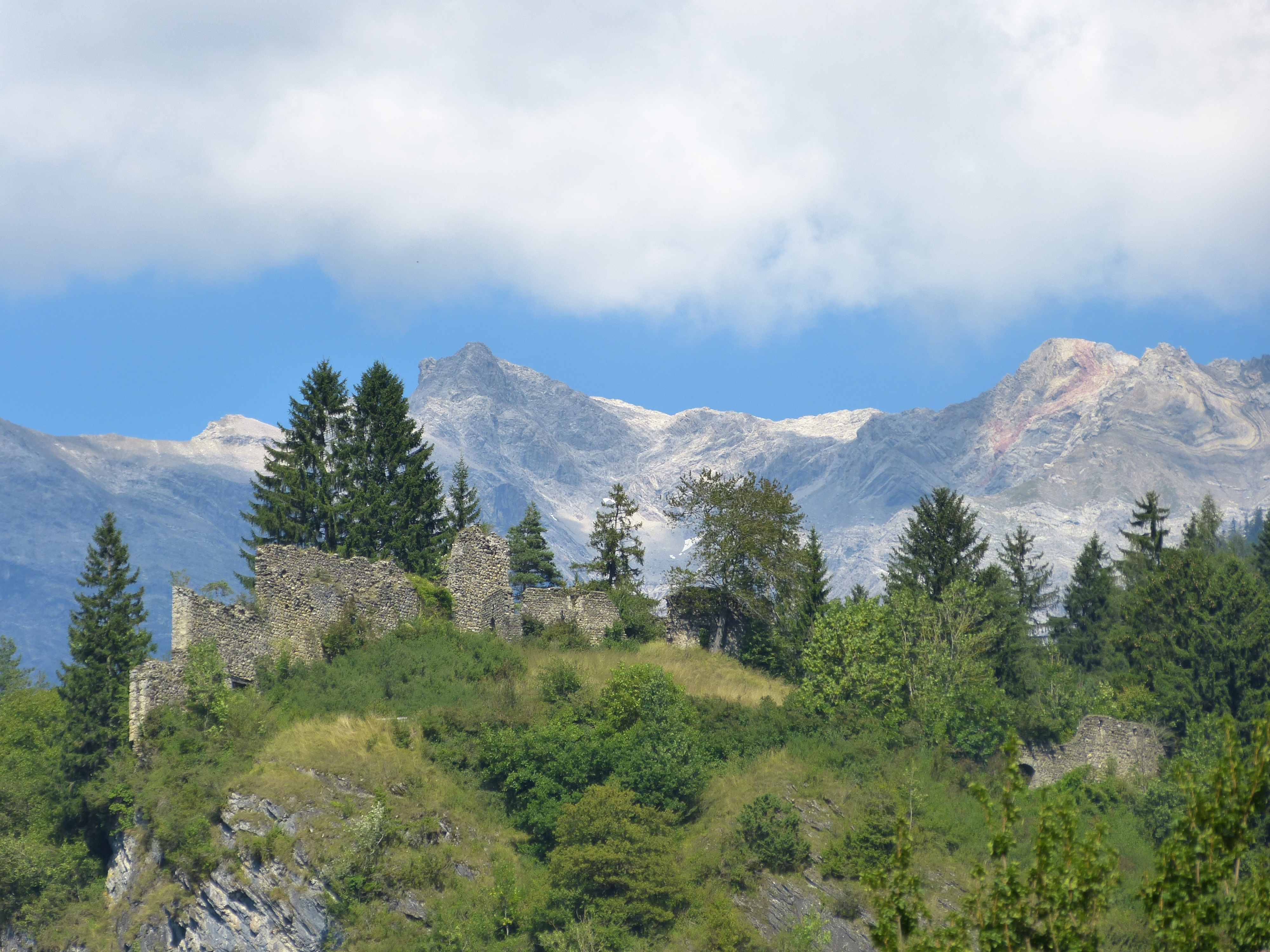 Burg Solavers